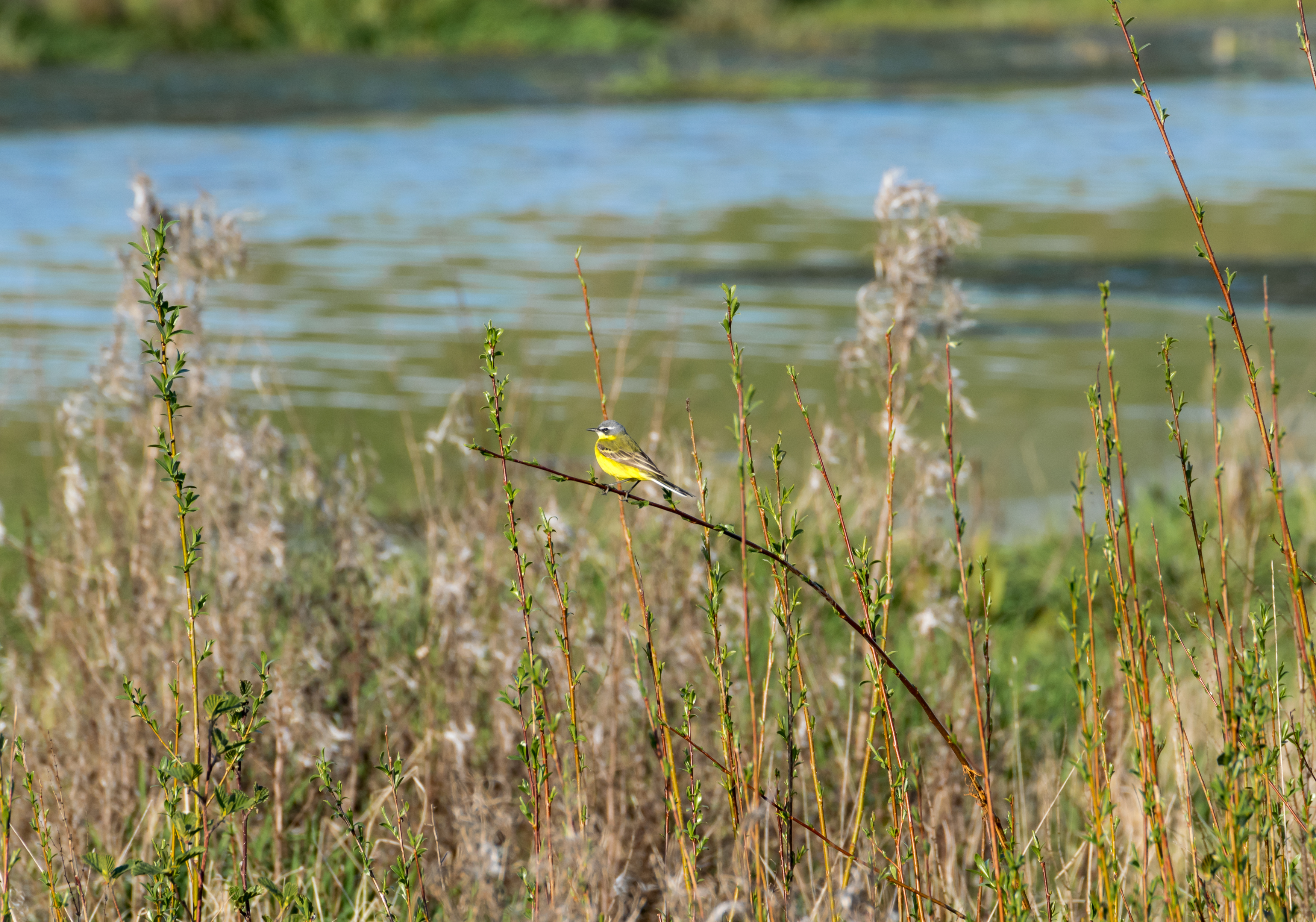 Schafstelze im Regenrückhaltebecken in Horn-Bad Meinberg-Belle im LSG Egge-Gebiet und Lipper Bergland mit Bielefelder Osning, Paderborner Hochfläche und Hellwegbörden